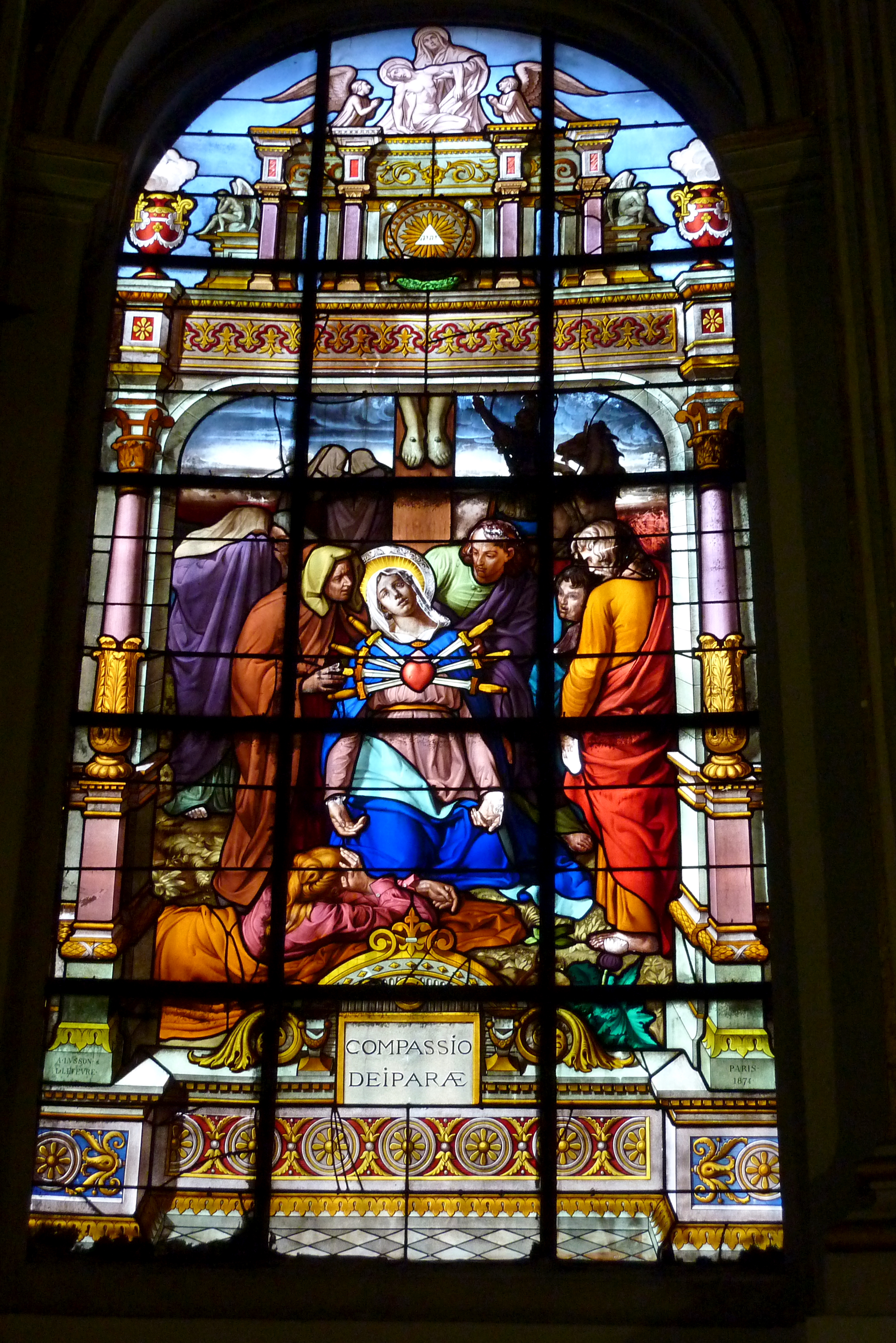 Katholische Pfarrkirche Saint-Laurent im 10. Arrondissement von Paris, Bleiglasfenster in der Kapelle Notre-Dame-des-Malades, Darstellung: Sieben Schmerzen Mariens; Inschrift: COMPASSIO DEIPARAE; Signatur: A. LUSSON & L. LEFEVRE (links), PARIS 1874 (rechts)